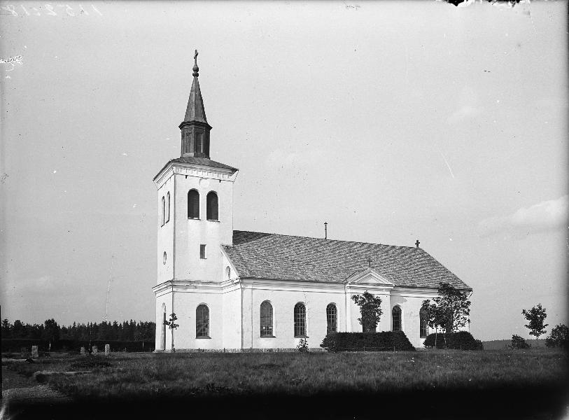 Kyrkan från sydväst. Nedbrunnen 1962. Snabbinv. Kategori: (01) ExteriörerKyrkan från sydväst. Nedbrunnen 1962. Snabbinv.